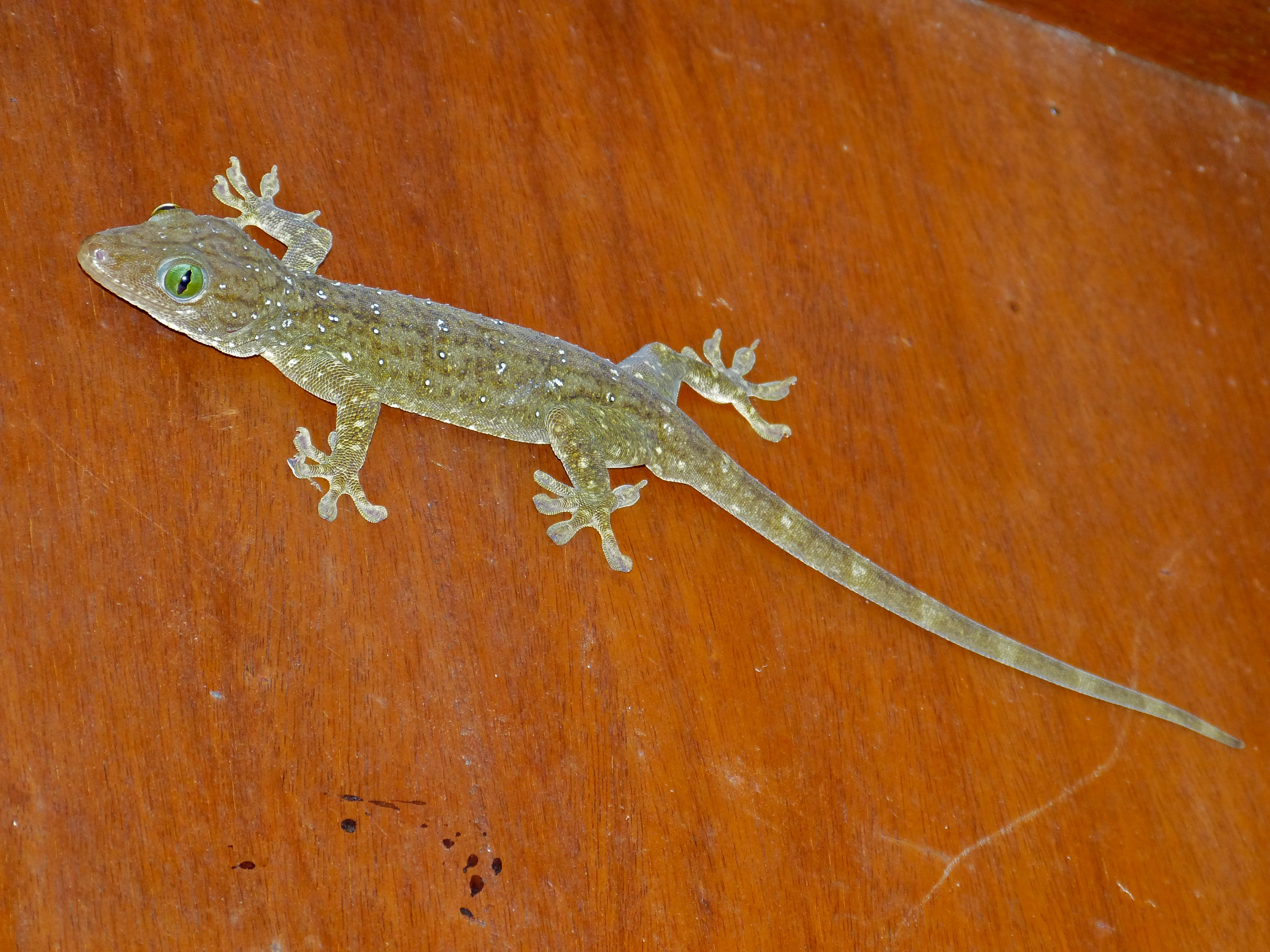 Bilit, Sabah, MALAYSIA